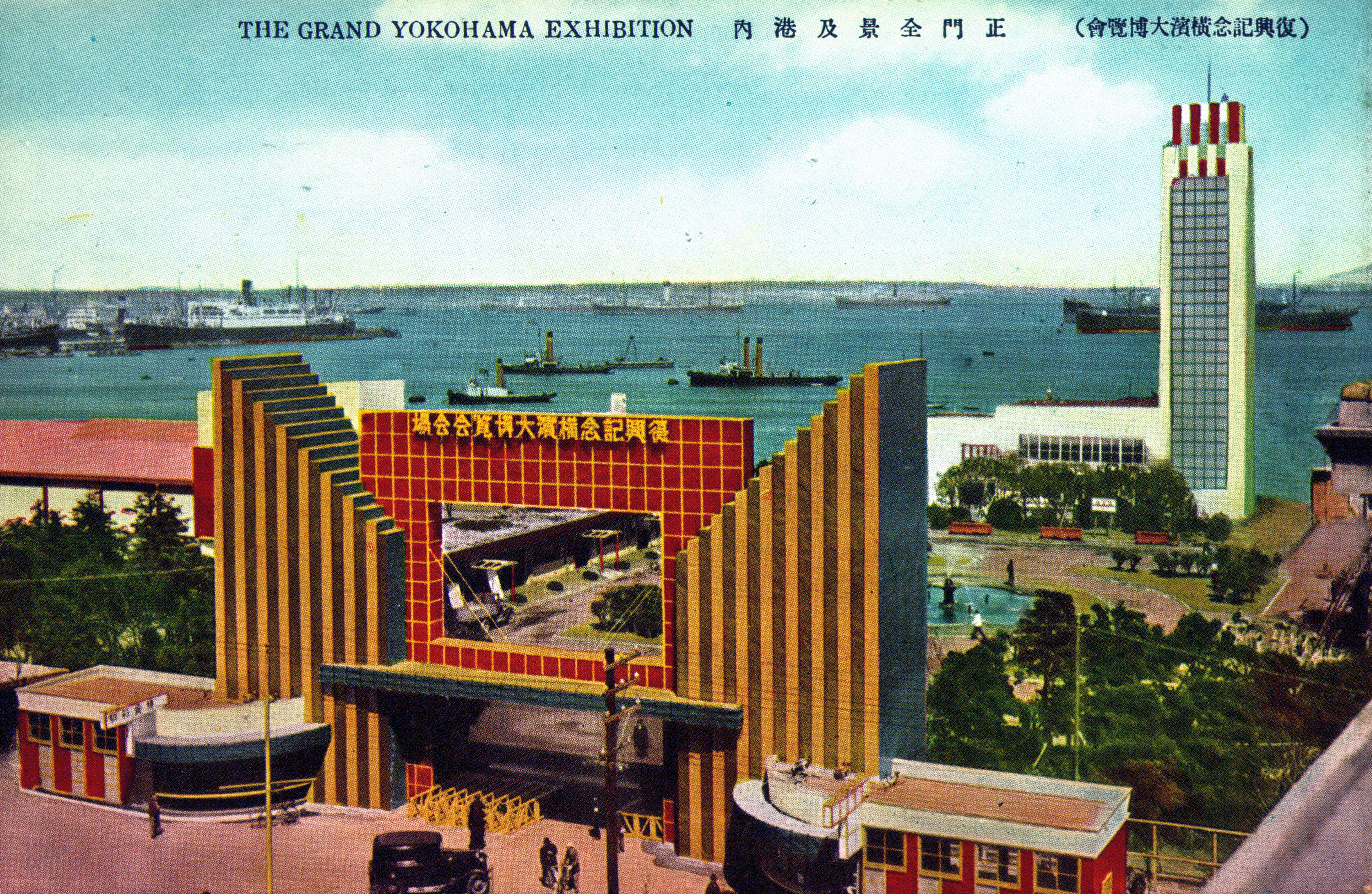 絵葉書「(復興記念横浜大博覧会) 正門全景及港内 THE GRAND YOKOHAMA EXHIBITION」 山下公園の正面入口に正門が設置されていた。